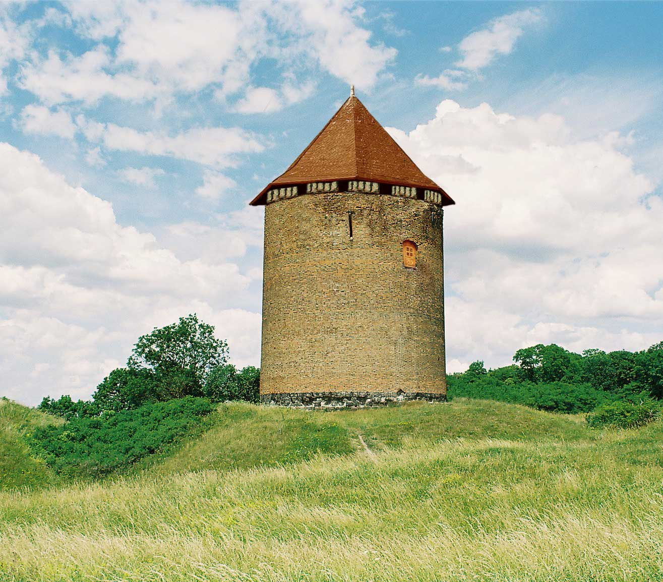 Stolper Turm als Rekonstruktion: Ich habe versucht, den Turm nach den Angaben von Dr. Ralf-Dietmar Hegel zu rekontruieren. Die Einschüsse des 2. Weltkrieges habe ich beseitigt, ebenso die nachträglich angebrachte Tür, die Mitte des 19. Jahrhunderts eingebaut wurde. Die Rekonstruktion stellt eine mögliche Ansicht des Turmes kurz vor seiner Erstürmung 1445 dar. Das Dach war mit Ziegeln Mönch/Nonne gedeckt, davon habe ich aber kein Bild, deshalb habe ich das Dach einer uralten spanischen Kathedrale draufgesetzt. Die Touristen wurden nach Hause geschickt, das Mauerwerk habe ich weitgehend neu verfugt. Es gibt keine gesicherten Hinweise, welche Form das Dach hatte, ein hohes Spitzdach ist für die Romanik unwahrscheinlich. Der Turm hatte Zinnen, welche Form und Ausmaße diese hatten, ist unbekannt. Die Ruine blieb von 1445 bis 1990 unberührt, die Reste des Daches wurden unfachmännisch entsorgt, was eine korrekte Rekonstruktion erschwert. Die eingebaute Tür war zu Zeiten der Nutzung des Turms wirklich der einzige Eingang! Wie die Bewohner des Turmes dorthingelangten, ist unbekannt. Informationsquelle: Informationsmaterial von Dr. Ralf-Dietmar Hegel sowie Turmführung